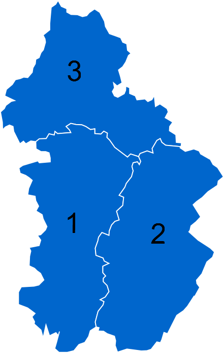 Résultats des élections législatives du Jura en 2012